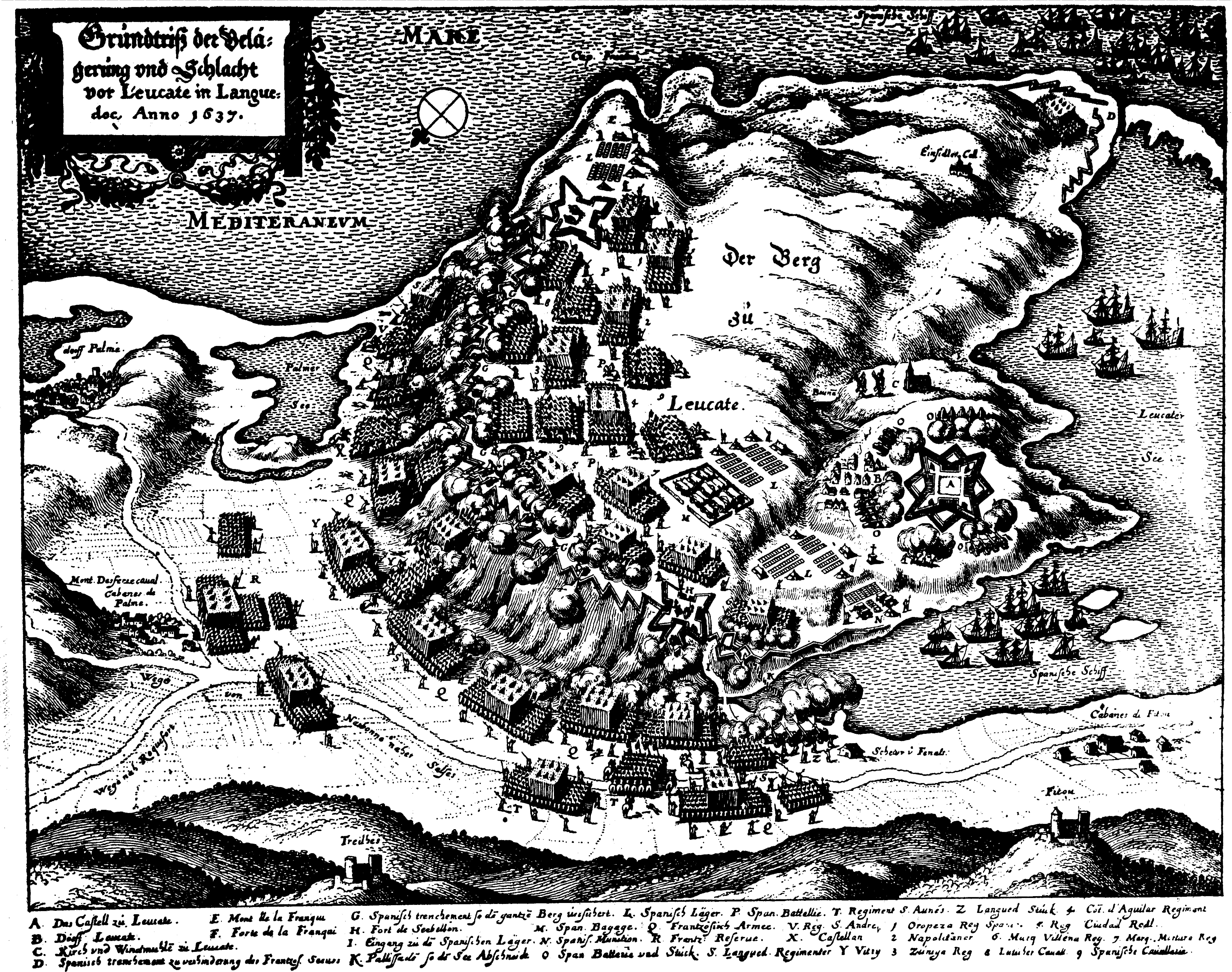 Batalla i setge de Leucata el 1637